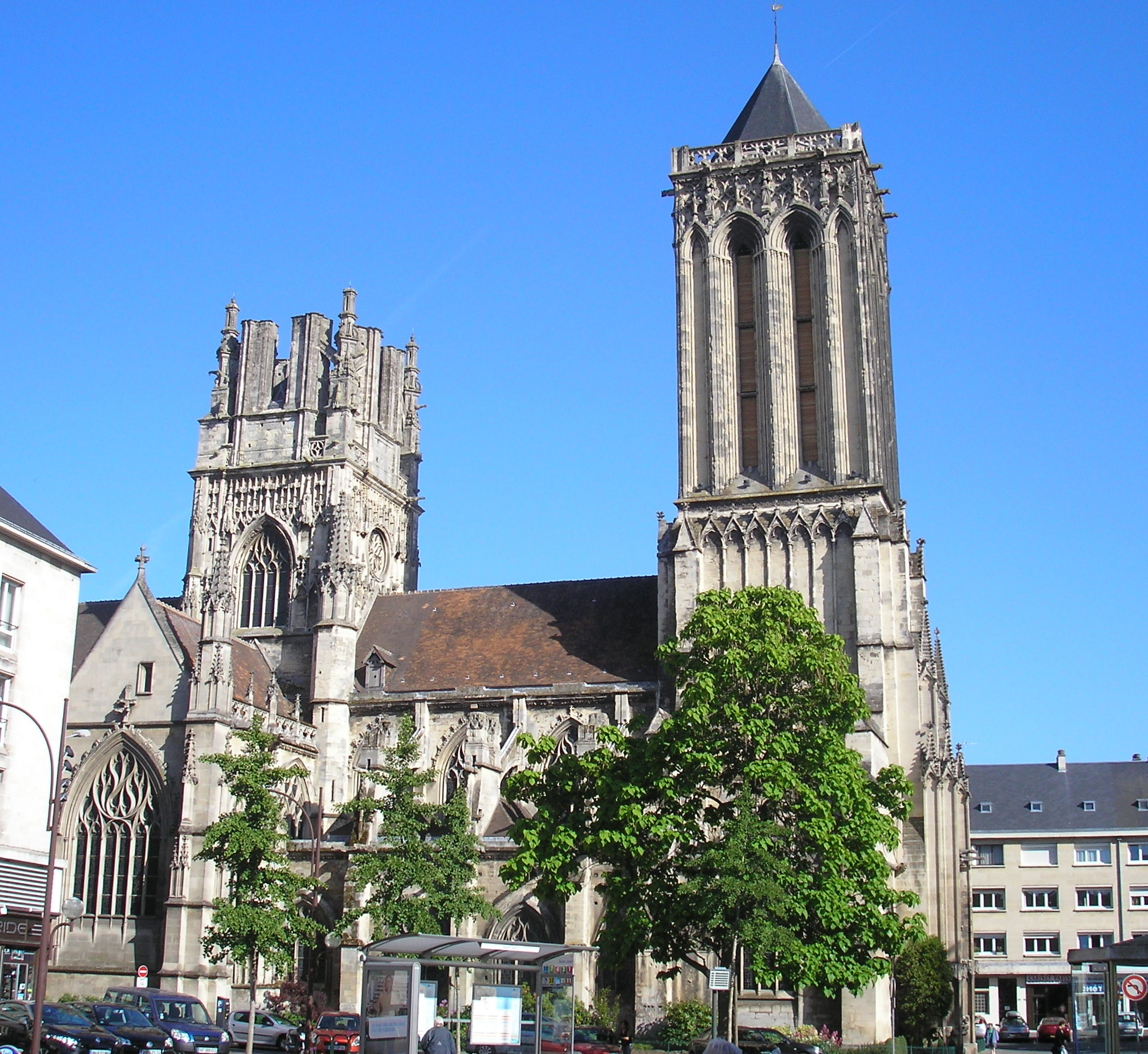 Caen (Normandie, France). Façade nord de l'église Saint-Jean.